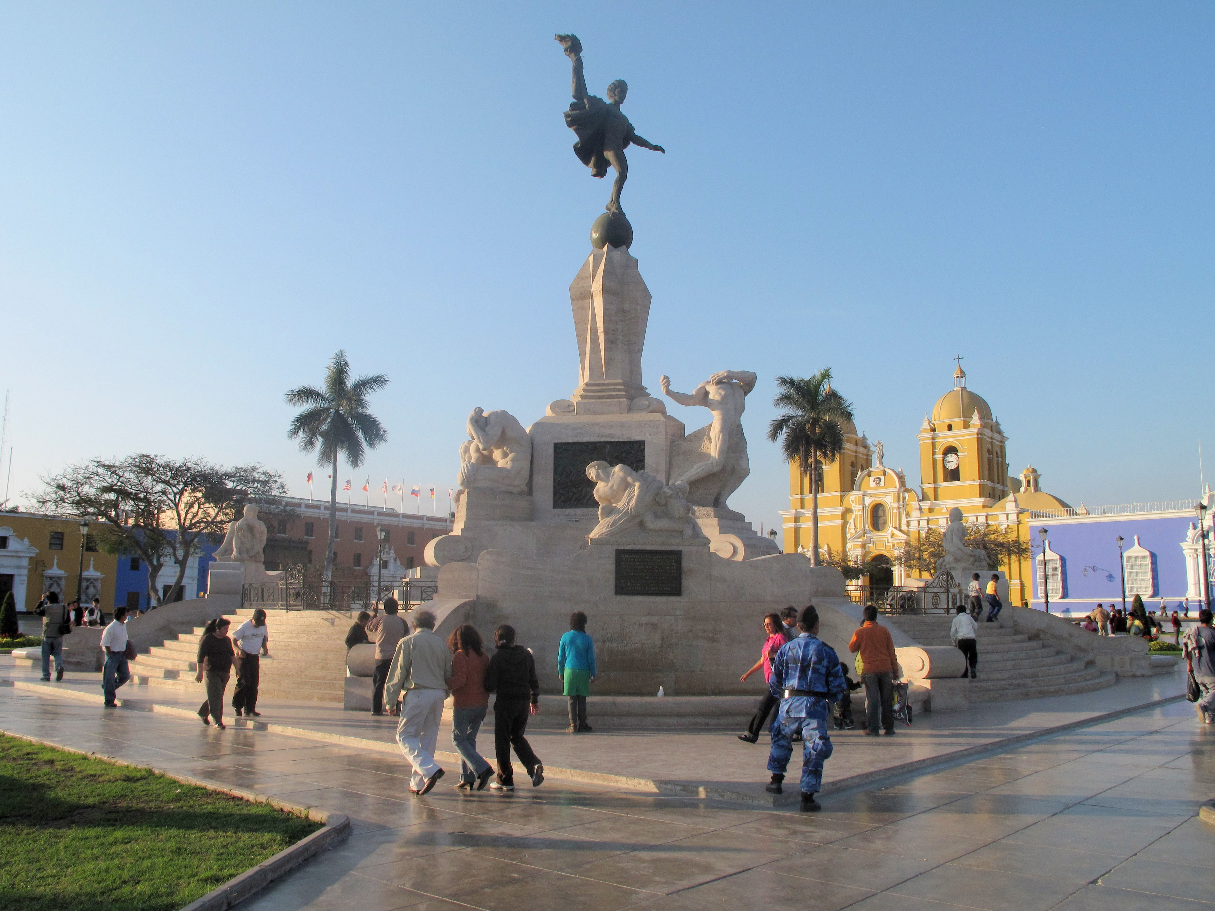 Un tarde cualquiera en la Plaza de Armas de Trujillo — Perú.